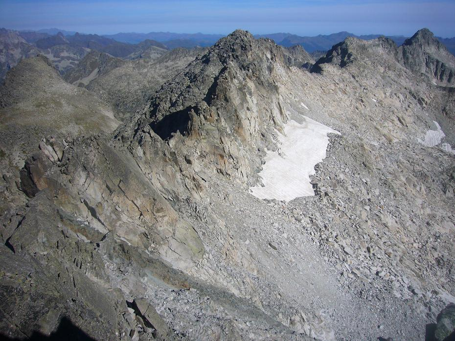 Pics de Besiberri, vistos des del Comoloforno; la Vall de Boí, Alta Ribagorça, Catalunya